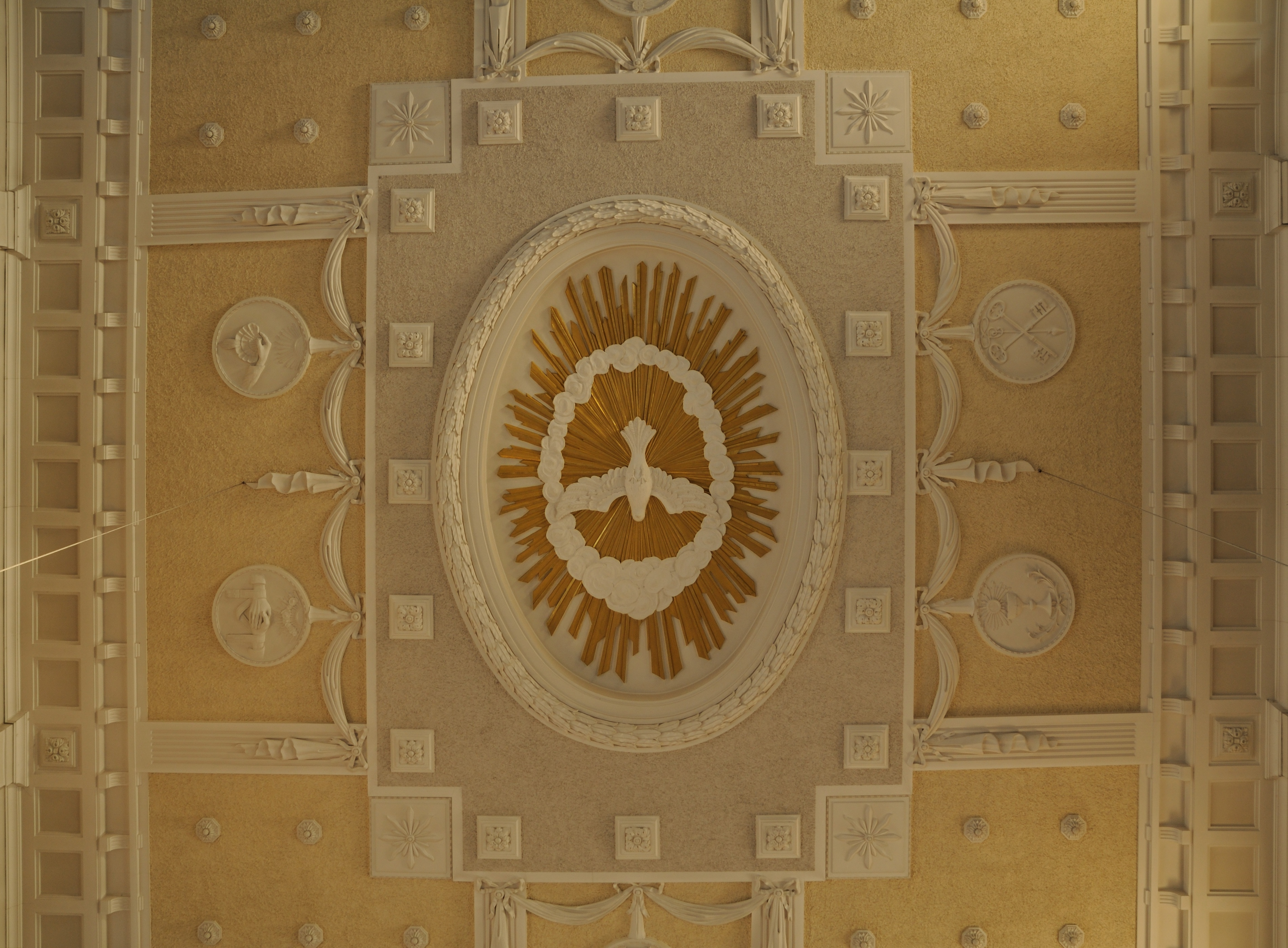 Rheinfelden: St. Josef, Deckenornament